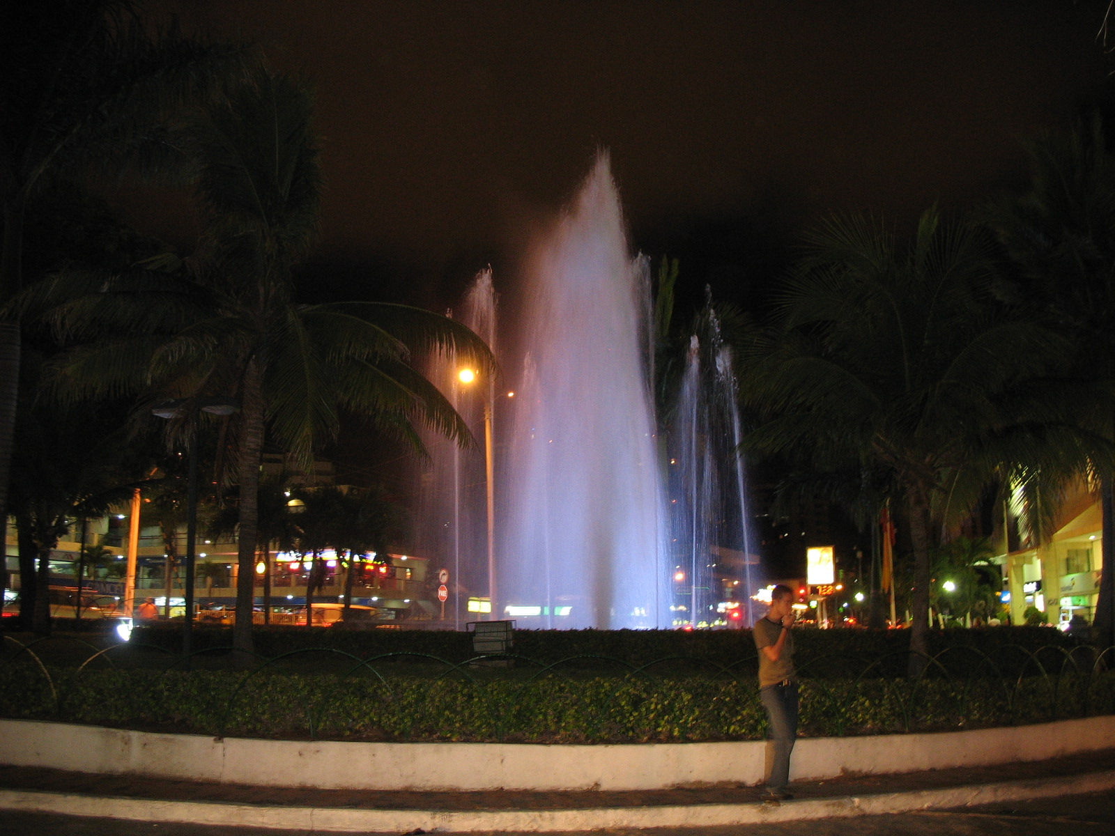 Fuente luminosa Villa Country (Barranquilla)